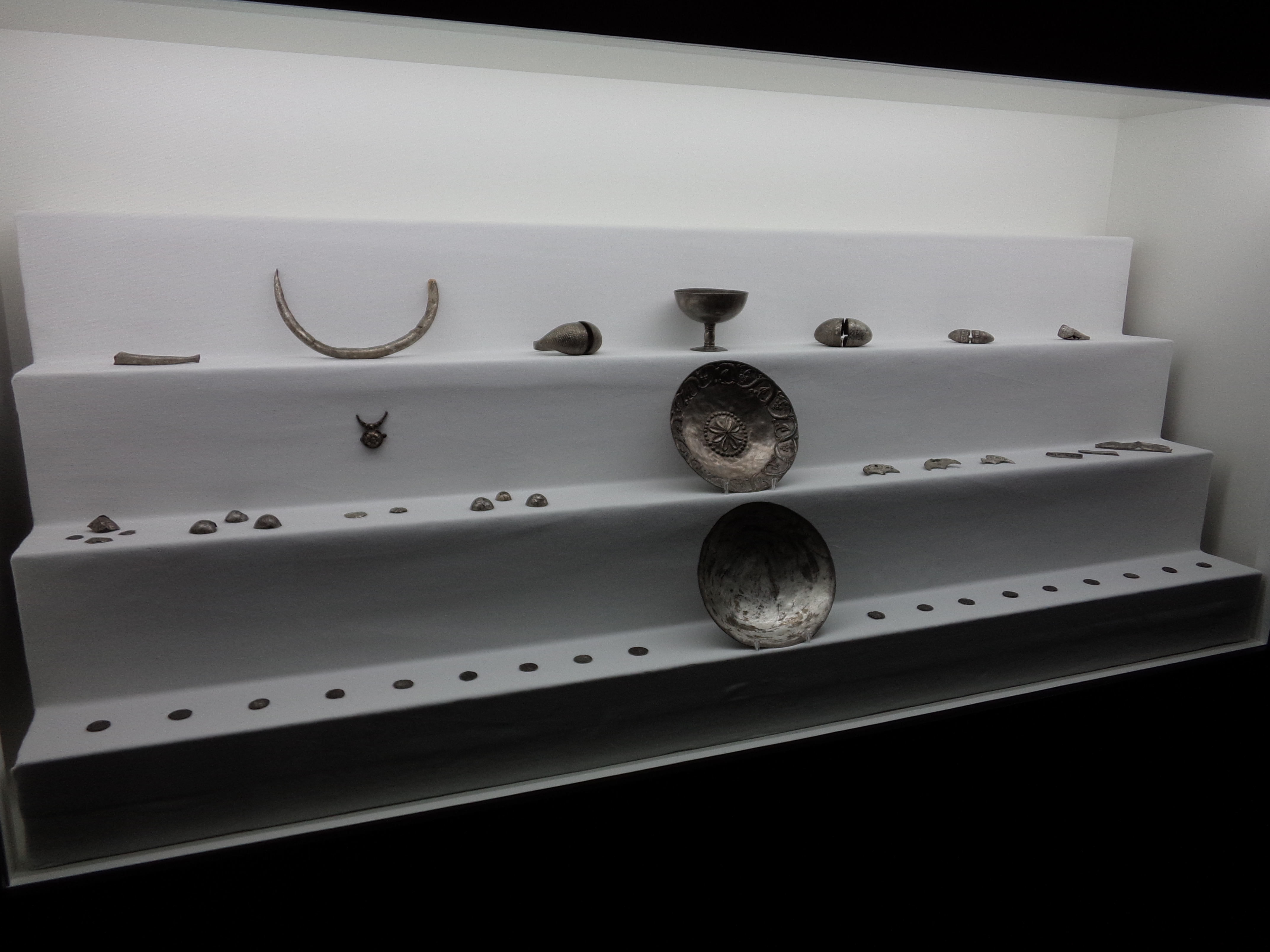 Nemesvarbóki kincslelet Pozsonyban